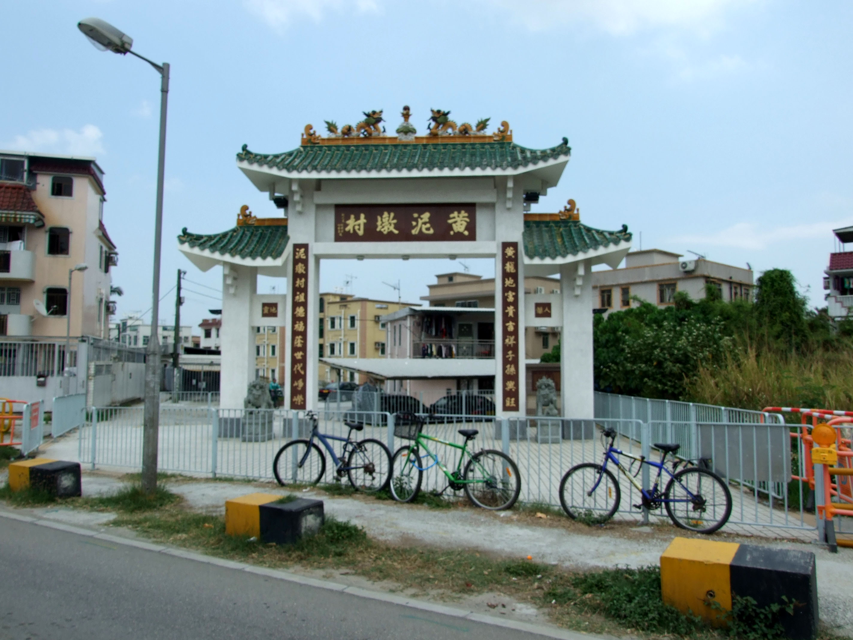 中文（香港）: 黃泥墩村牌樓